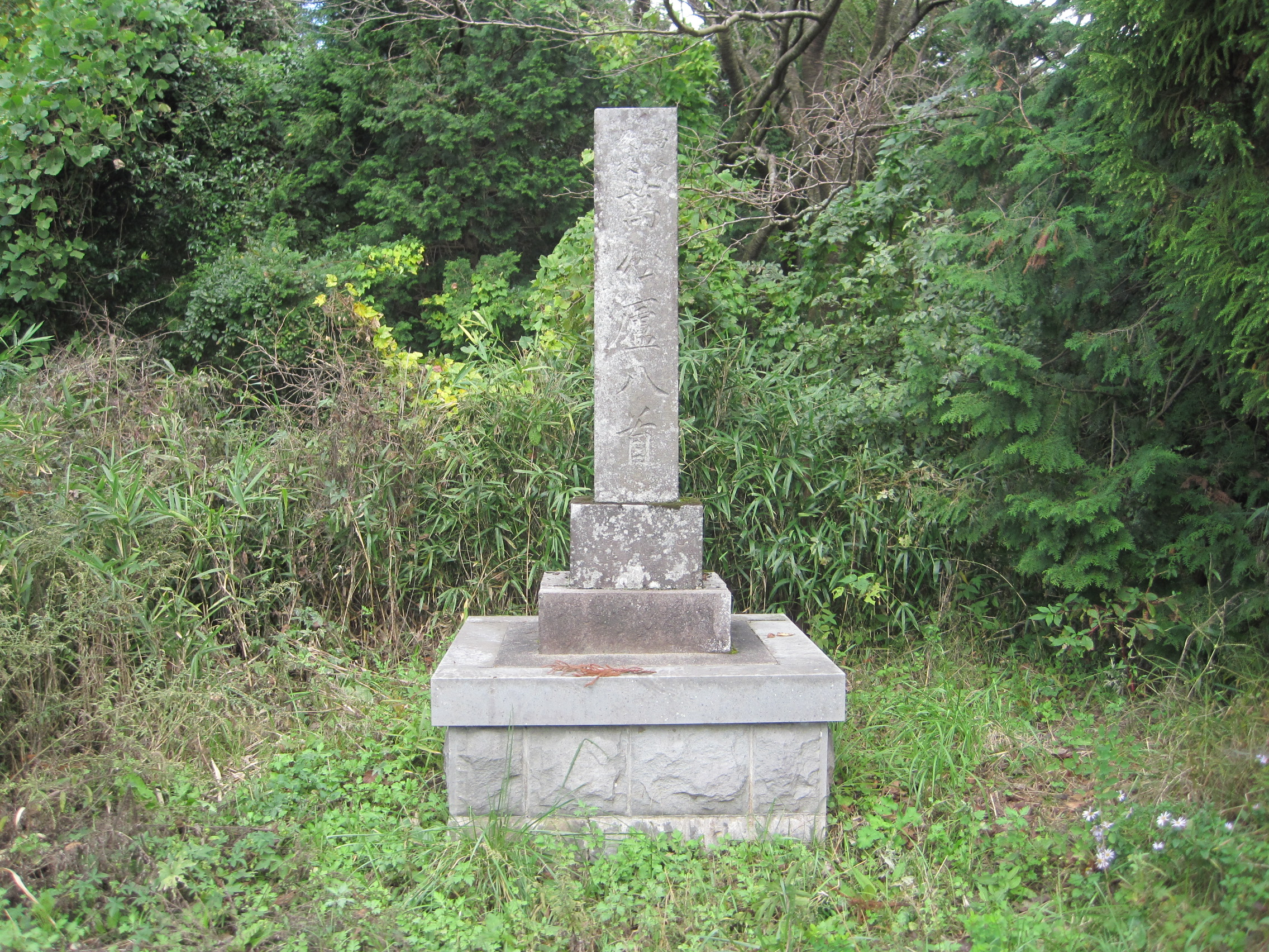 阿蘇市、万松盧跡 - 高本紫溟の旧居